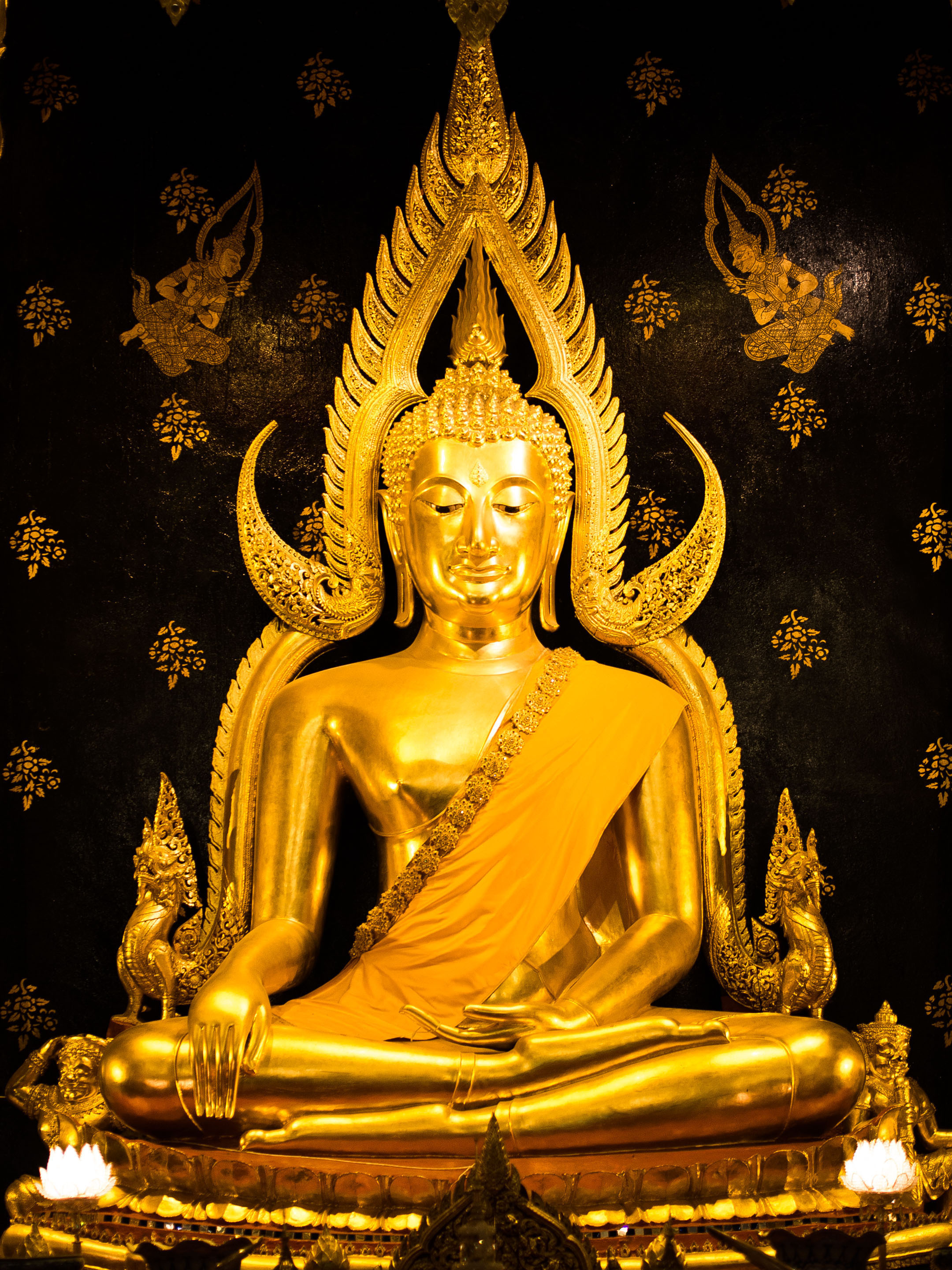 inspired by you.